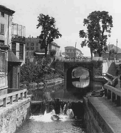 Naviglio della Martesana - La conca dell'Incoronata nel 1920